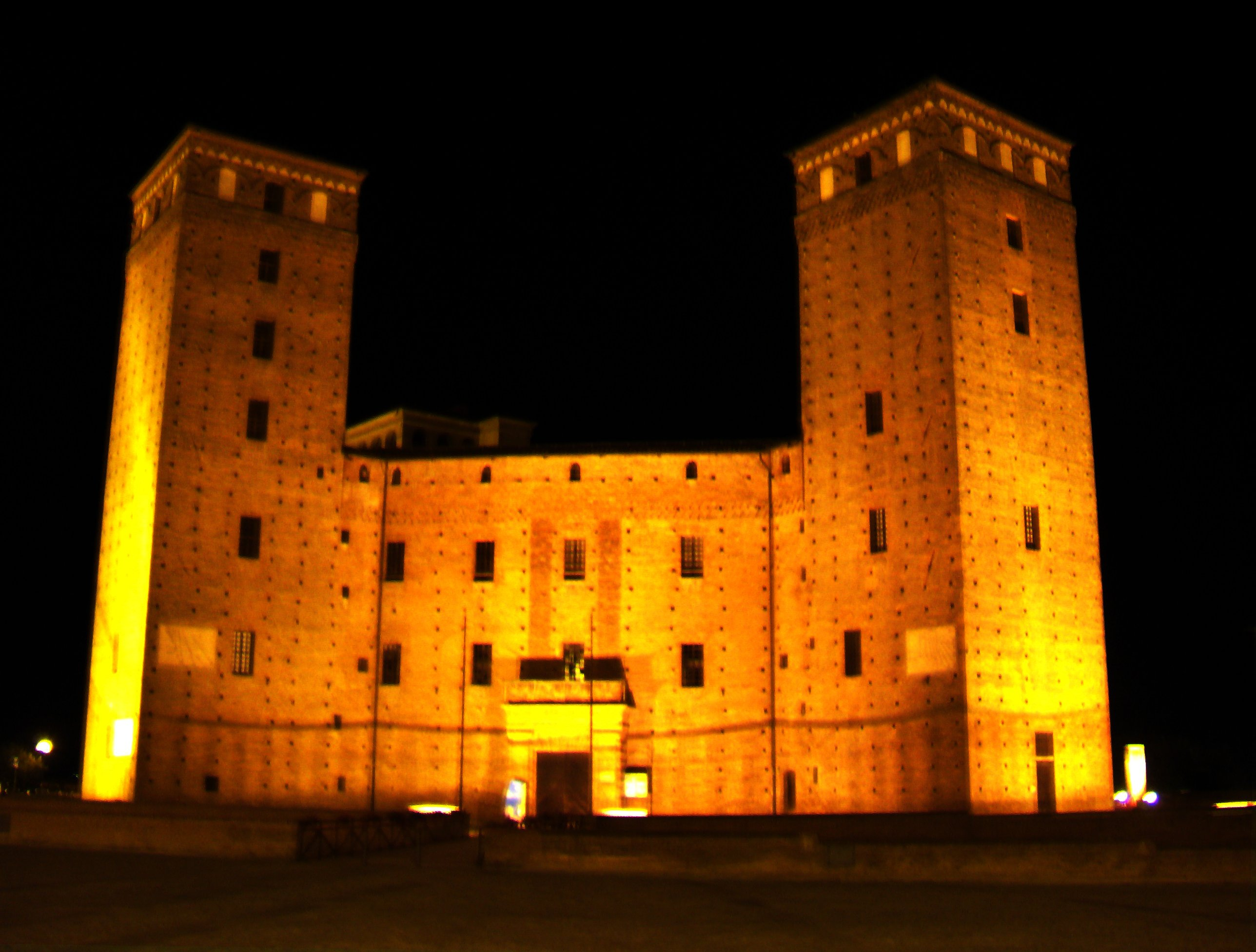 paris france